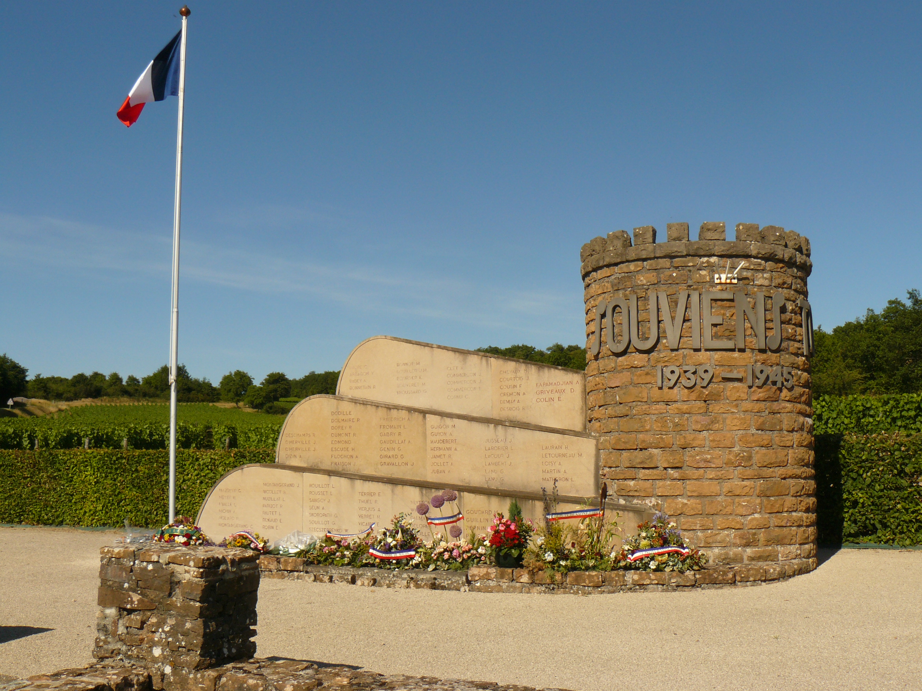 107 noms de résistants, fusillés, morts en déportation ou otages de la région de Brancion (entre la vallée de la Grosne et leTournugeois) sont inscrits sur ce monument érigé en 1950 grâce à une souscription des anciens résistants et des habitants de plusieurs communes de la région